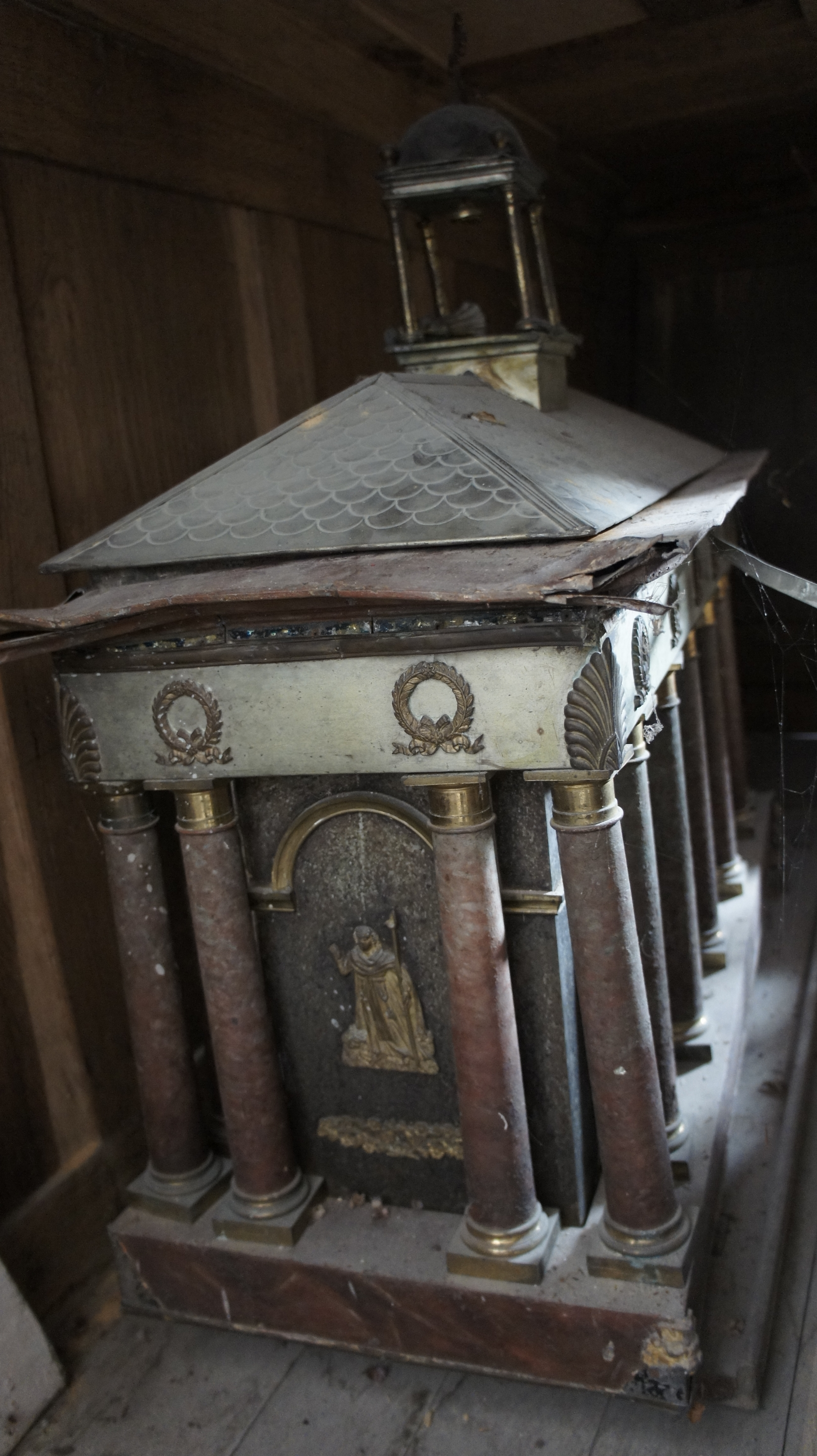 Chasse de saint lié de villedommange